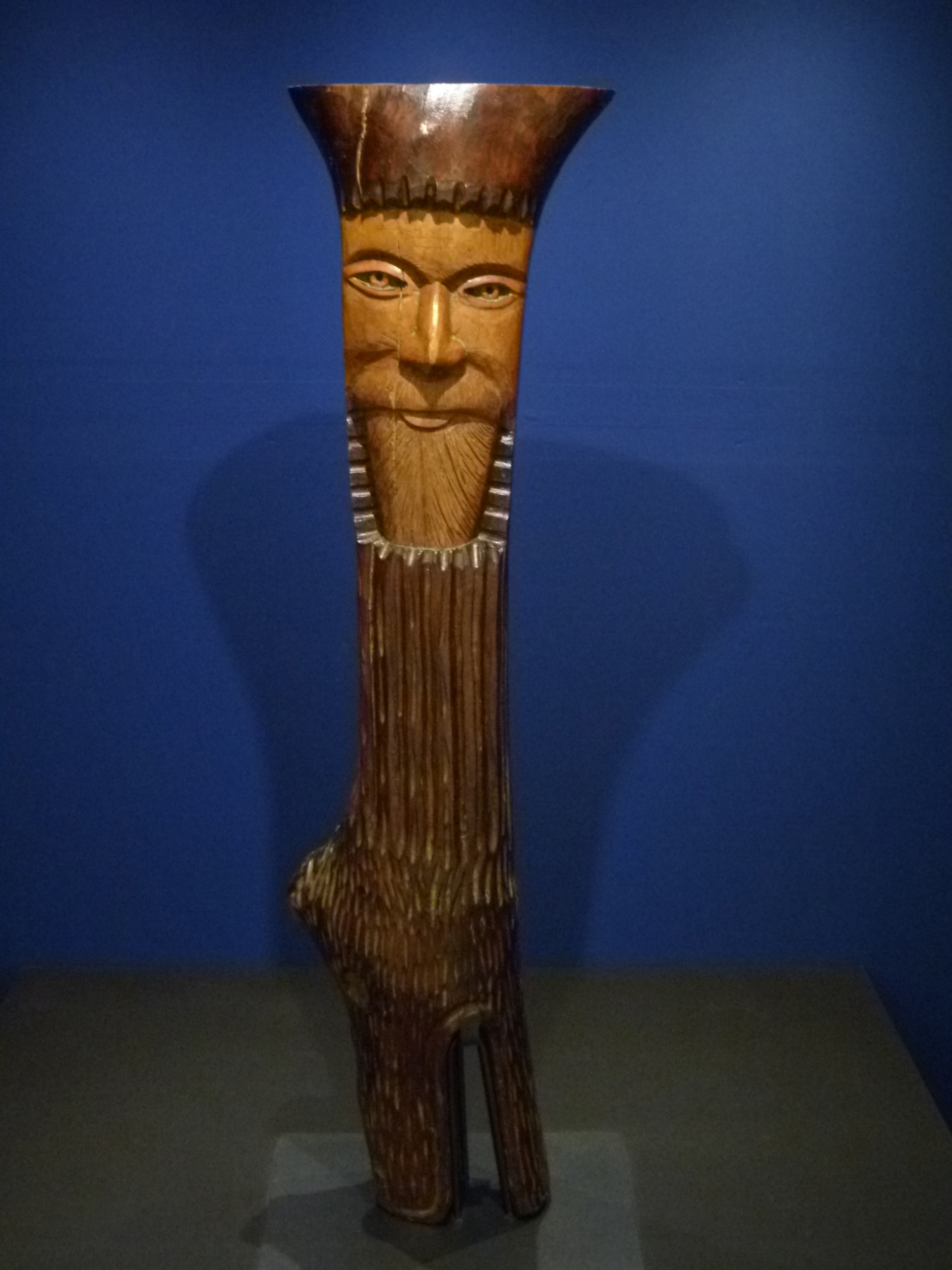 Bois vernis, attribué à l'Abbé Fouéré (1839-1910); Art brut ; Lille métropole : Musée d'art moderne, d'art contemporain et d'art brut; Villeneuve d'Asq, France